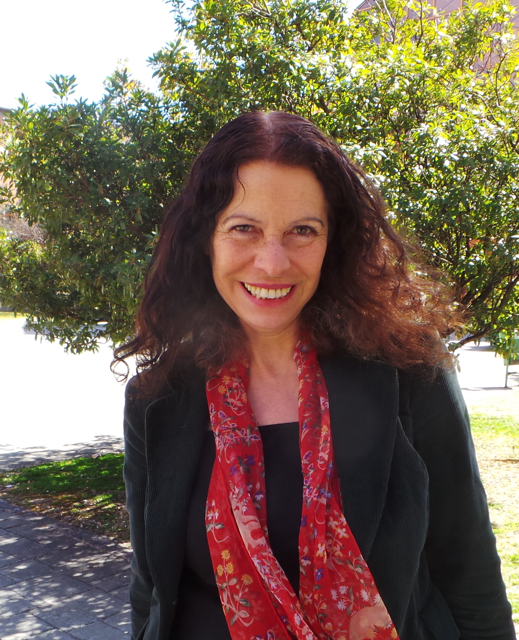 Filósofa y pensadora ecofeminista Fotografía realizada en el Campus de Vicálvaro de la Universidad Rey Juan Carlos de Madrid